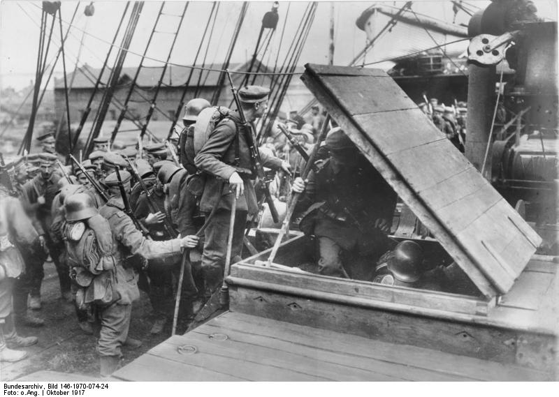 Zur Besetzung der Insel Ösel. Truppen gehen im Heimathafen an Bord eines Transportdampfers [12.-20. Oktober 1917]